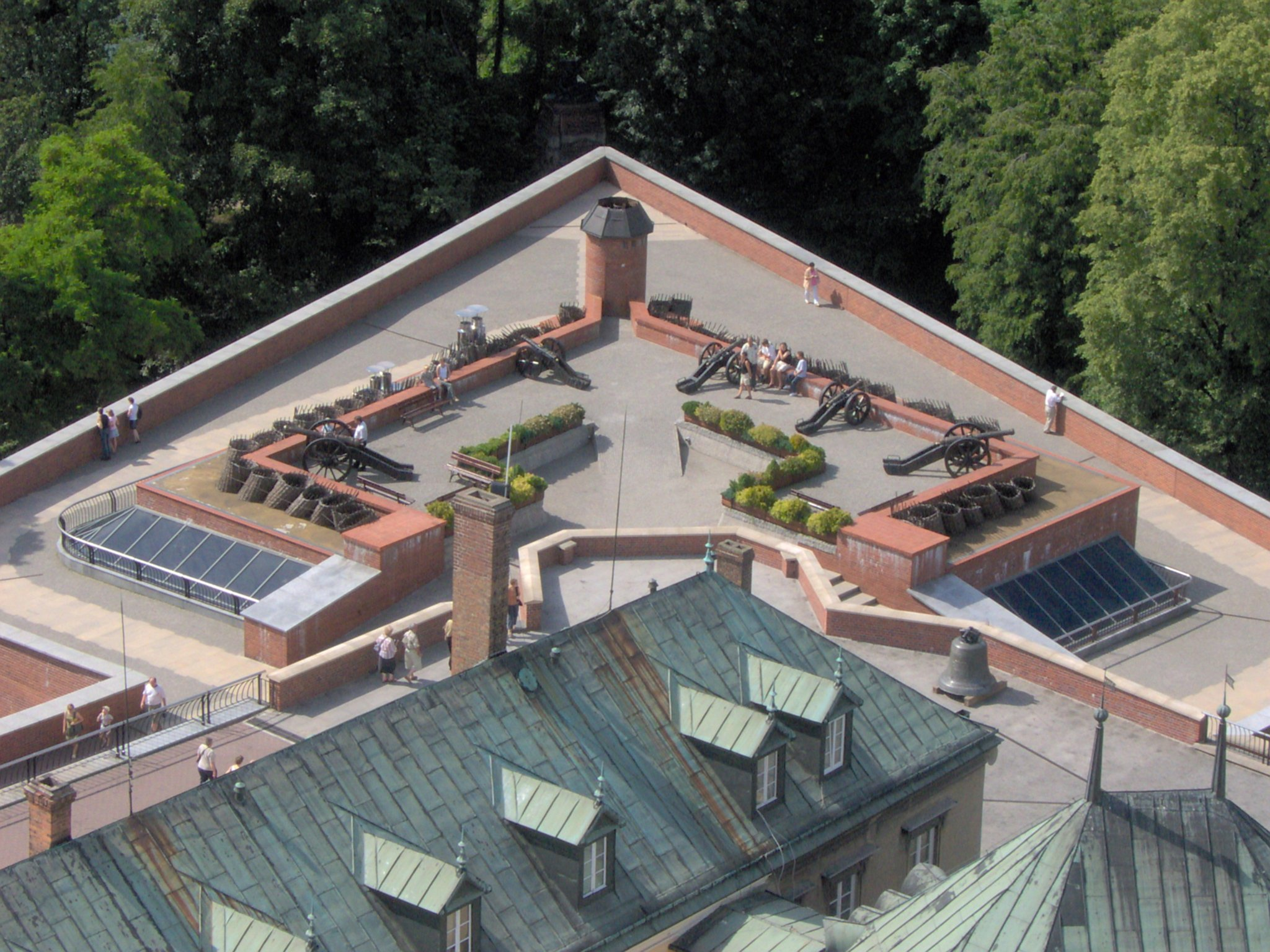 Fragment fortyfikacji widziany z wieży